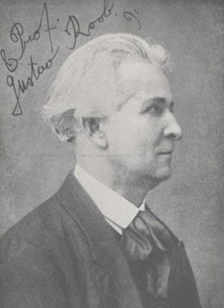 Augustin Václav Tomáš Roob (1879 - 1947), Český hudební skladatel.